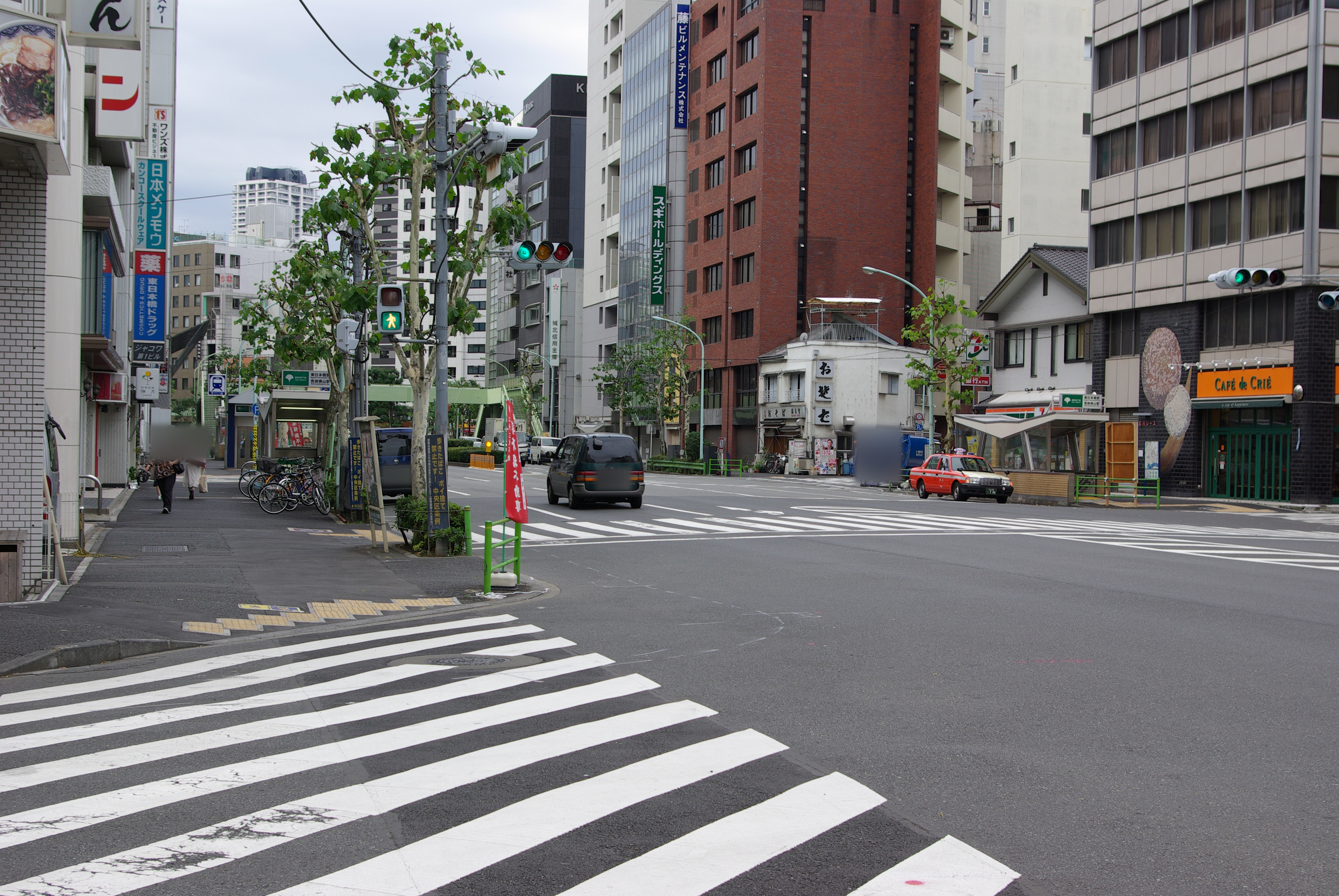 都営地下鉄浅草線東日本橋駅